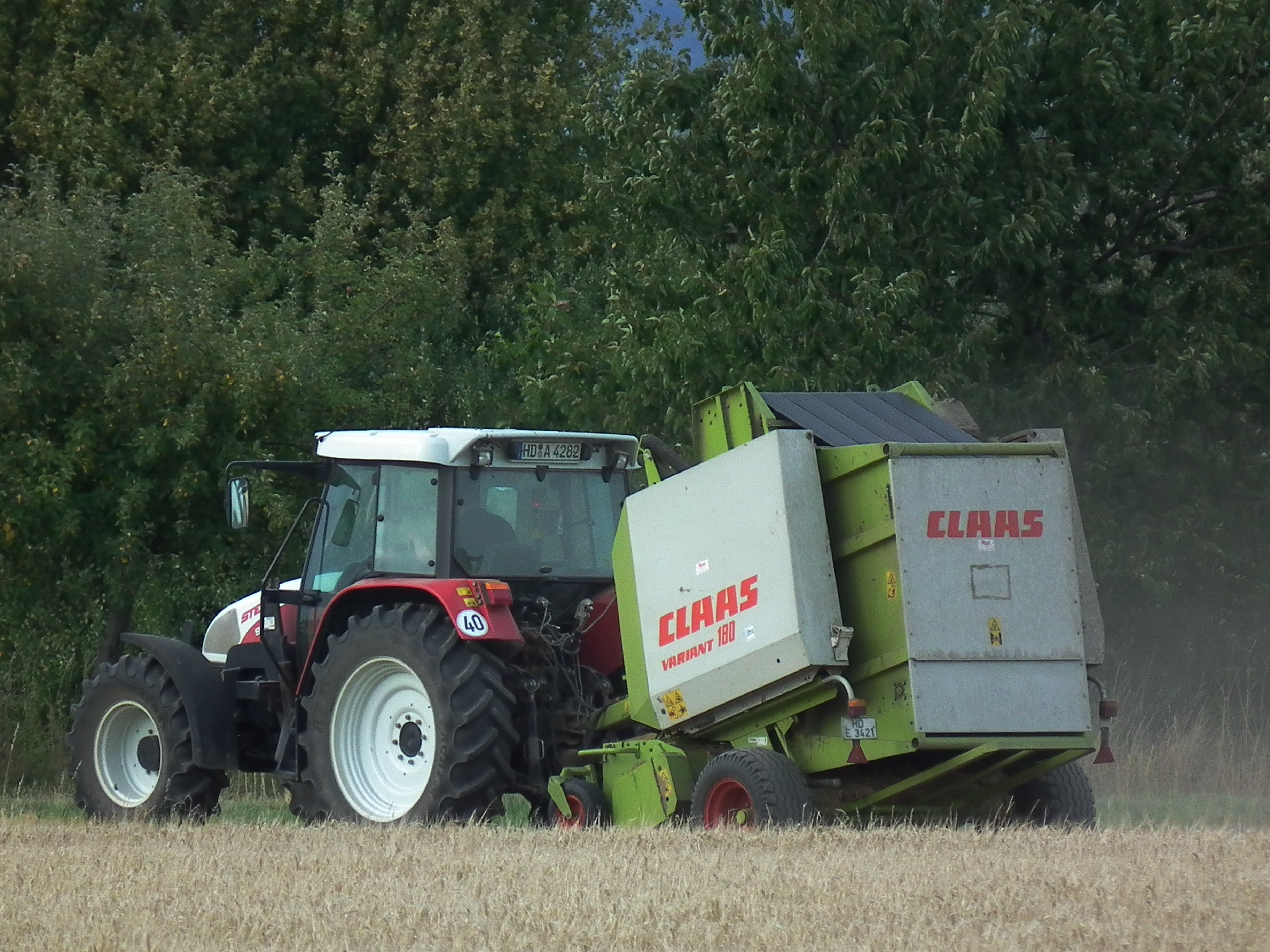 Traktor Steyr 9100M mit Rundballenpresse Claas Variant 180, fotografiert in Heidelberg (Baden-Württemberg, Deutschland)